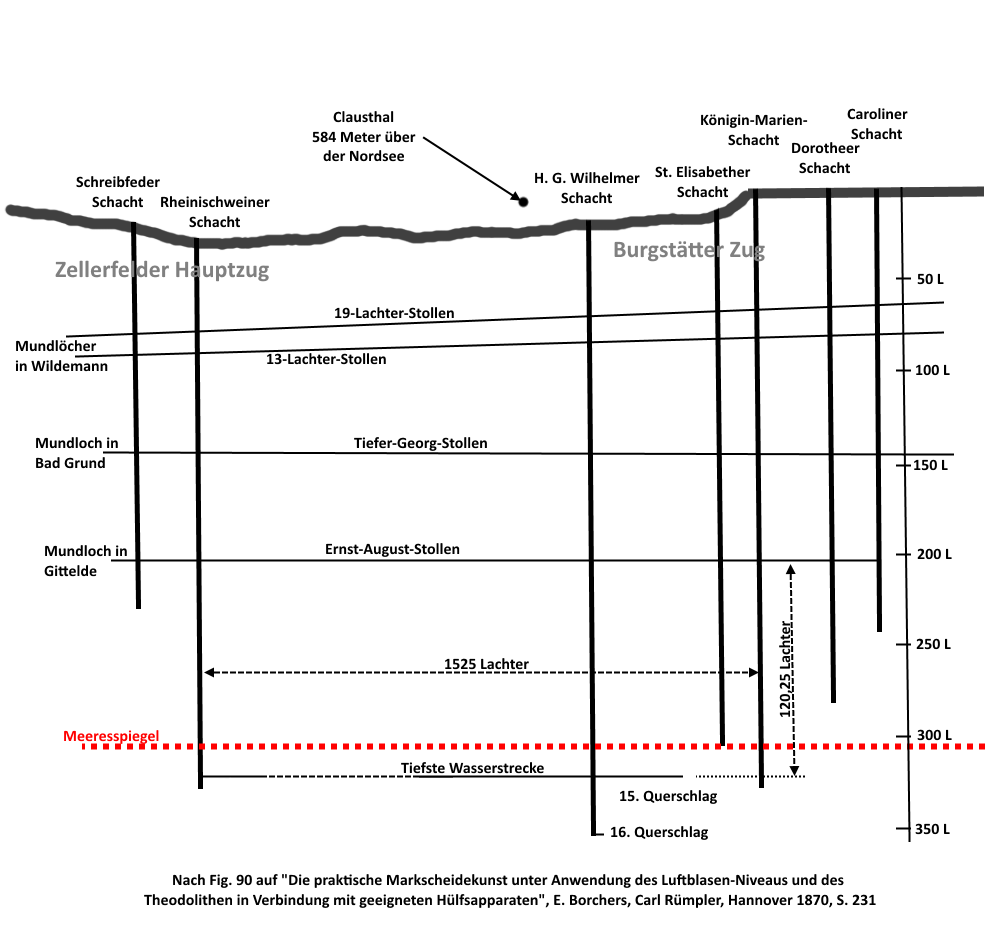 Burgstätter und Zellerfelder Gangzug Nach Fig. 90 aus "Die praktische Markscheidekunst unter Anwendung des Luftblasen-Niveaus und des Theodolithen in Verbindung mit geeigneten Hülfsapparaten", E. Borchers, Carl Rümpler, Hannover 1870, S. 231